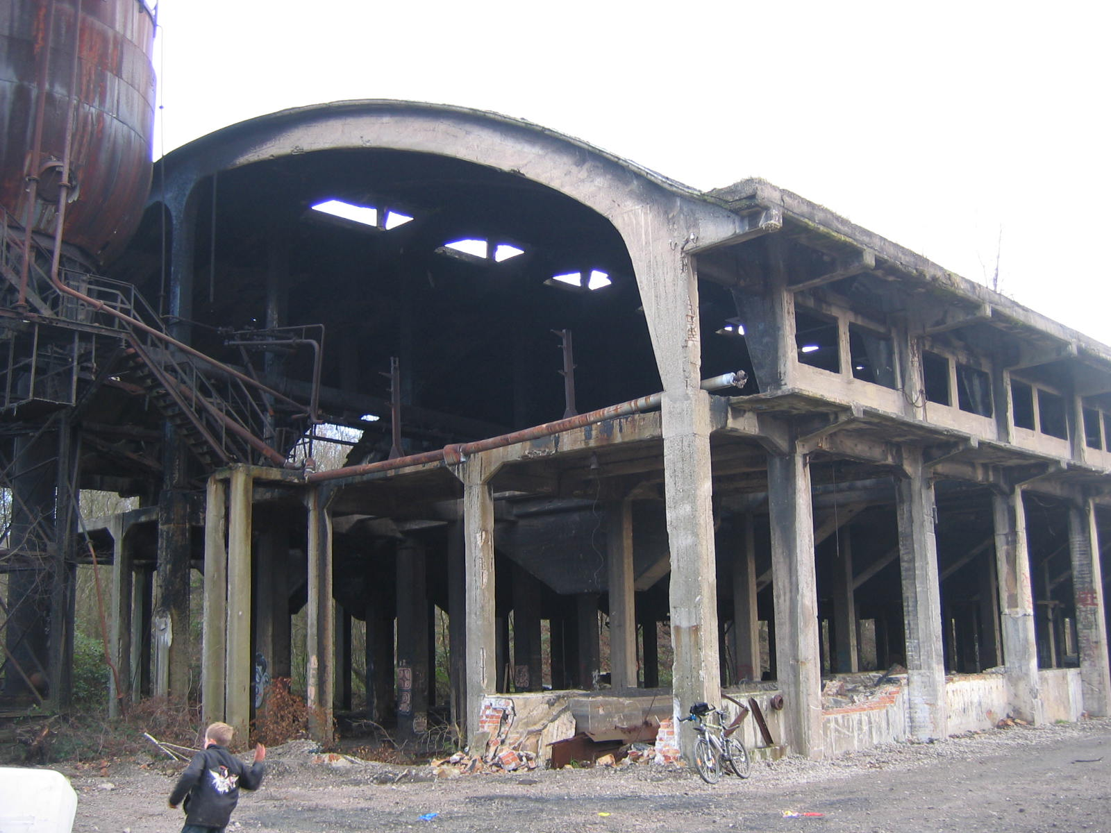 Pechhalle der Zeche "Chemischen" von König Ludwig